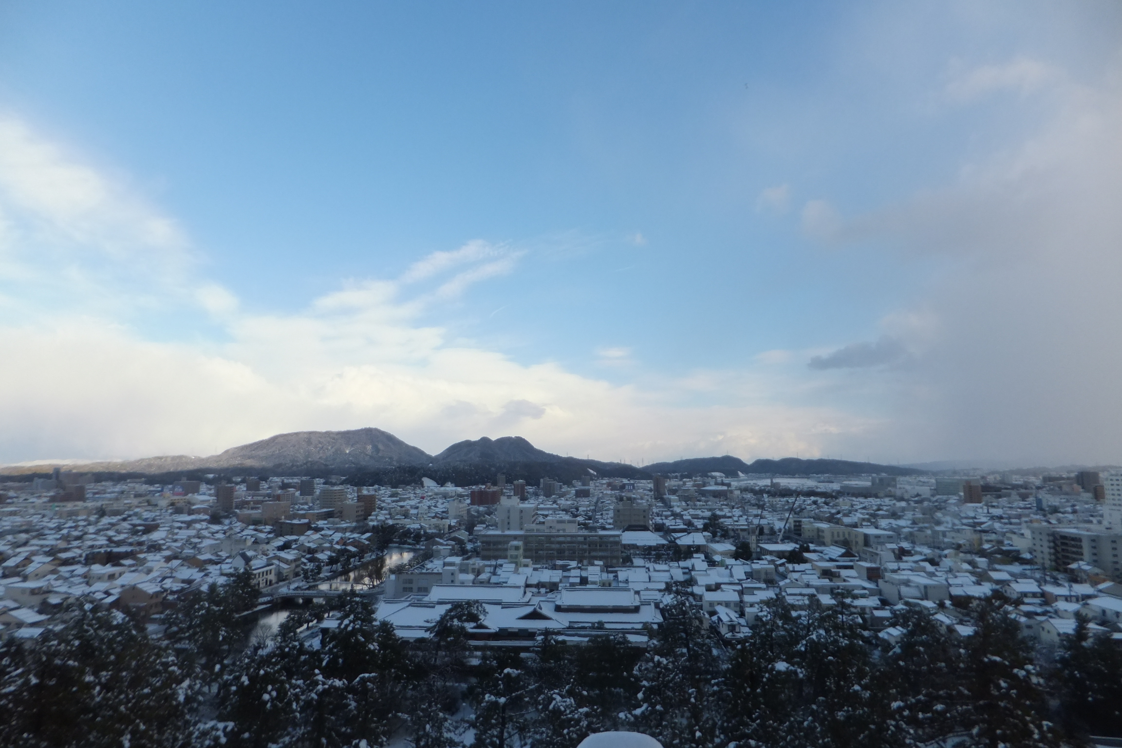 松江市街地